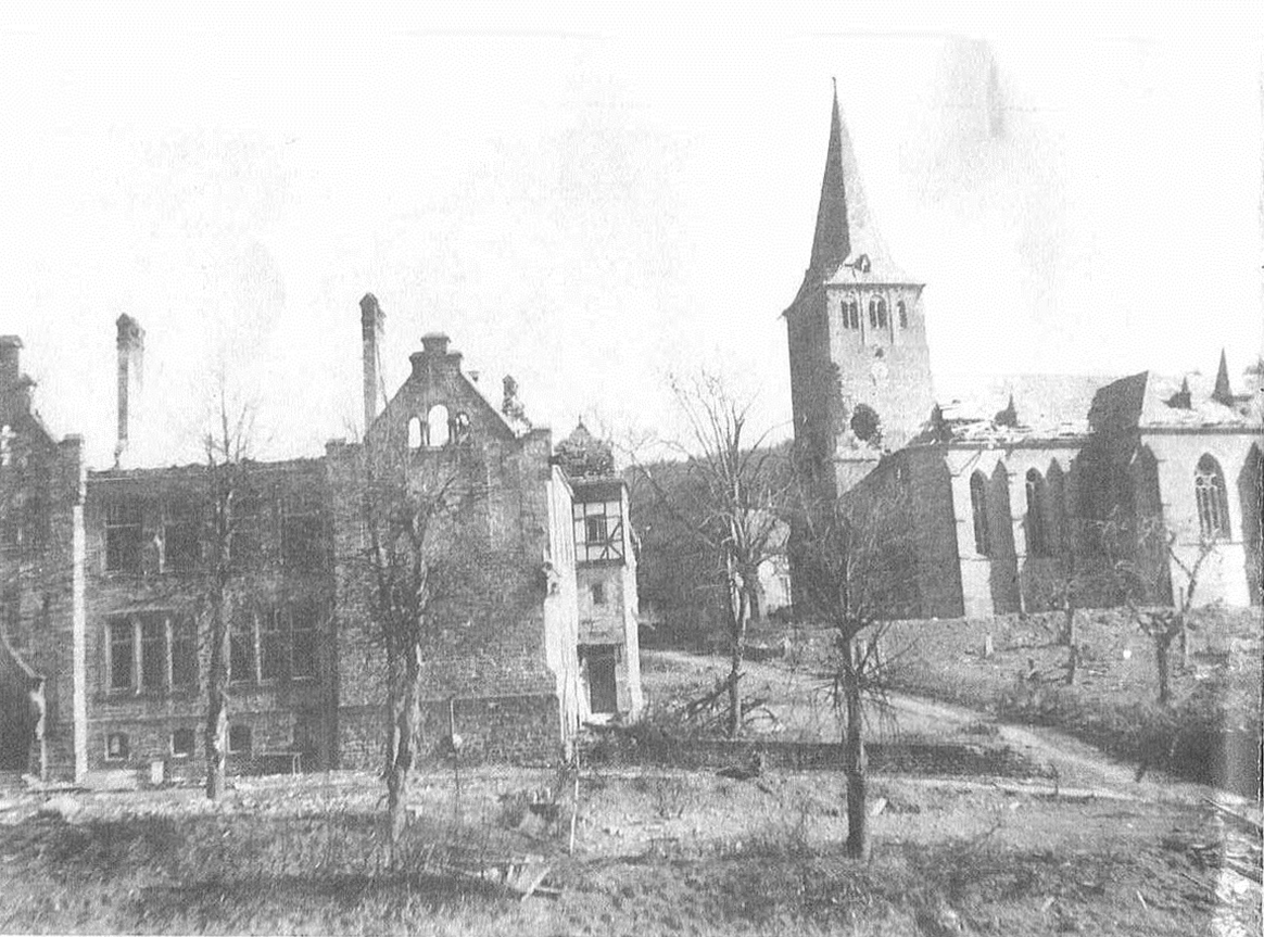 Ortskern rund um die Kirche St. Peter und Paul in Engelskirchen nach Bombardierung im März 1945